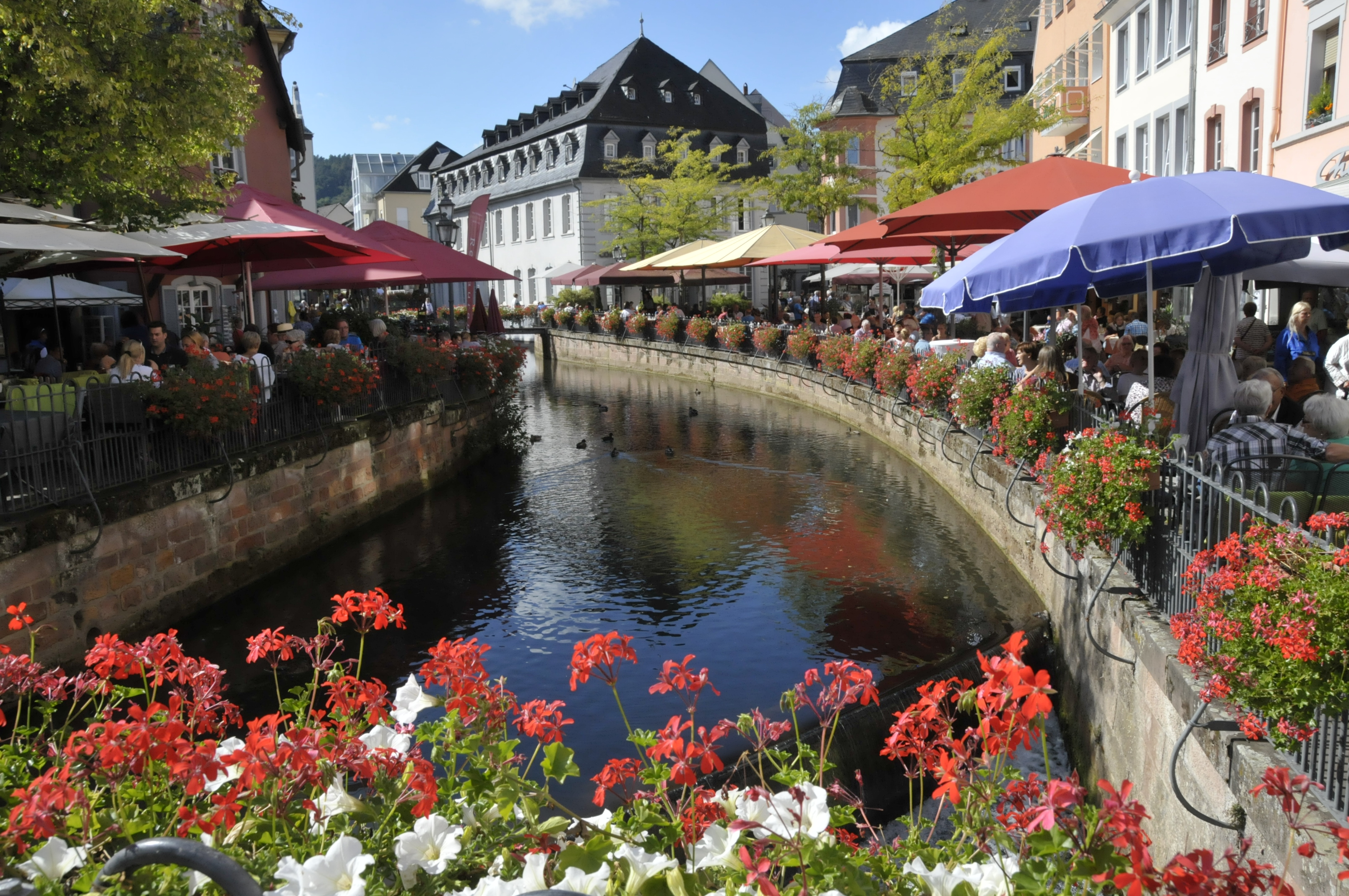 Saarburg, Leuk-Stau